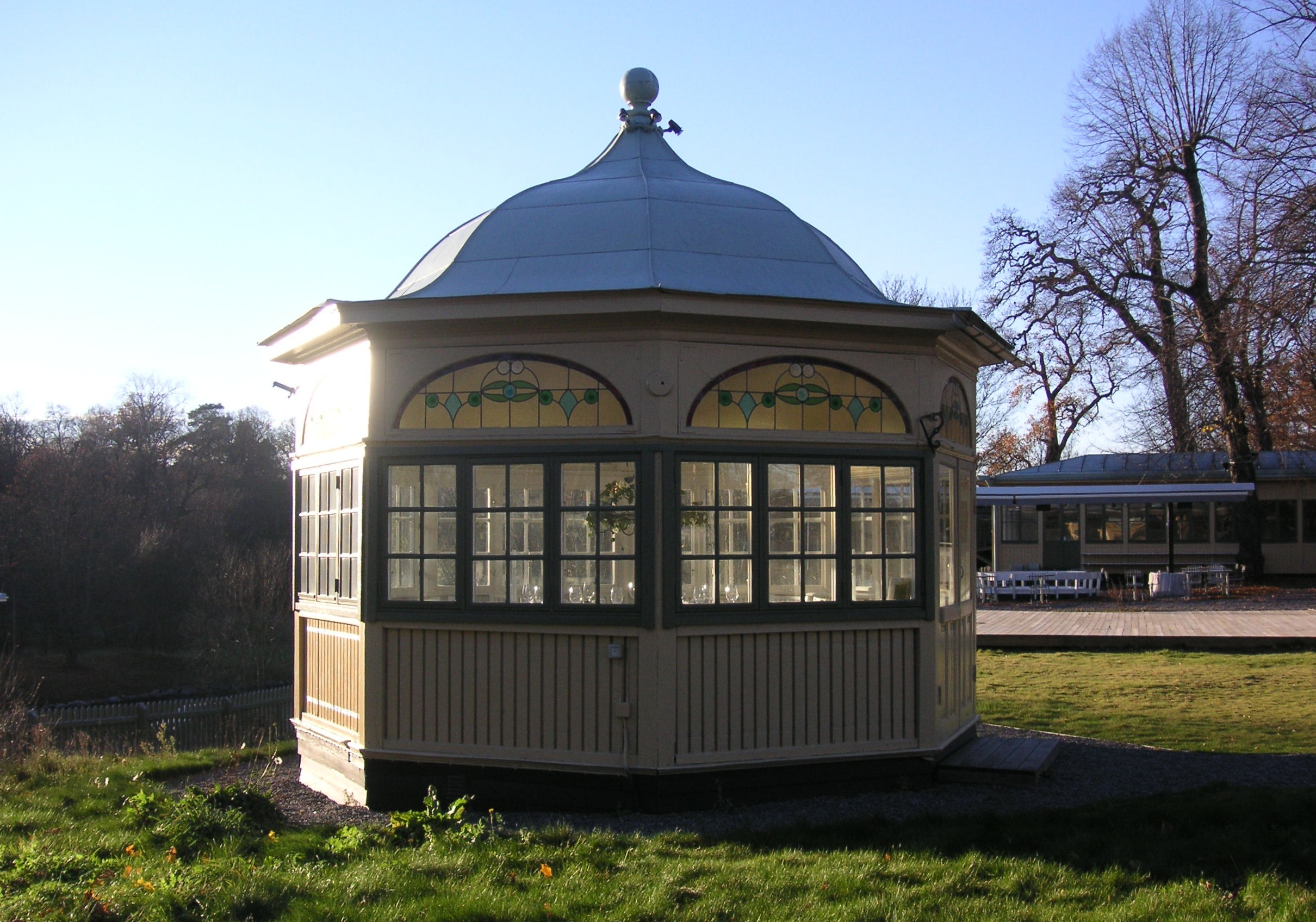 Djurgårdsbrunn på Gärdet, Stockholm